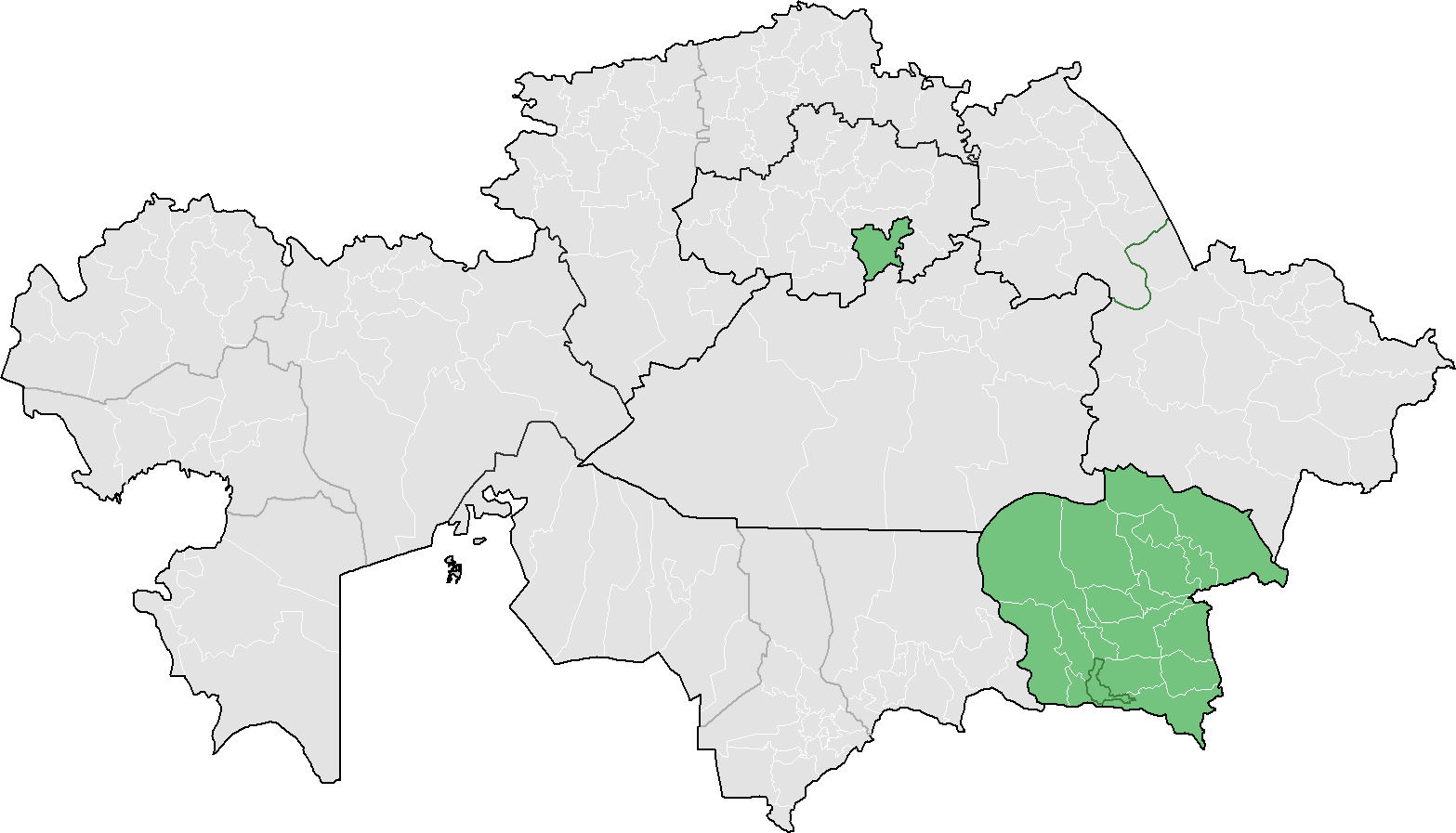 Астанайская и Алматинская епархия